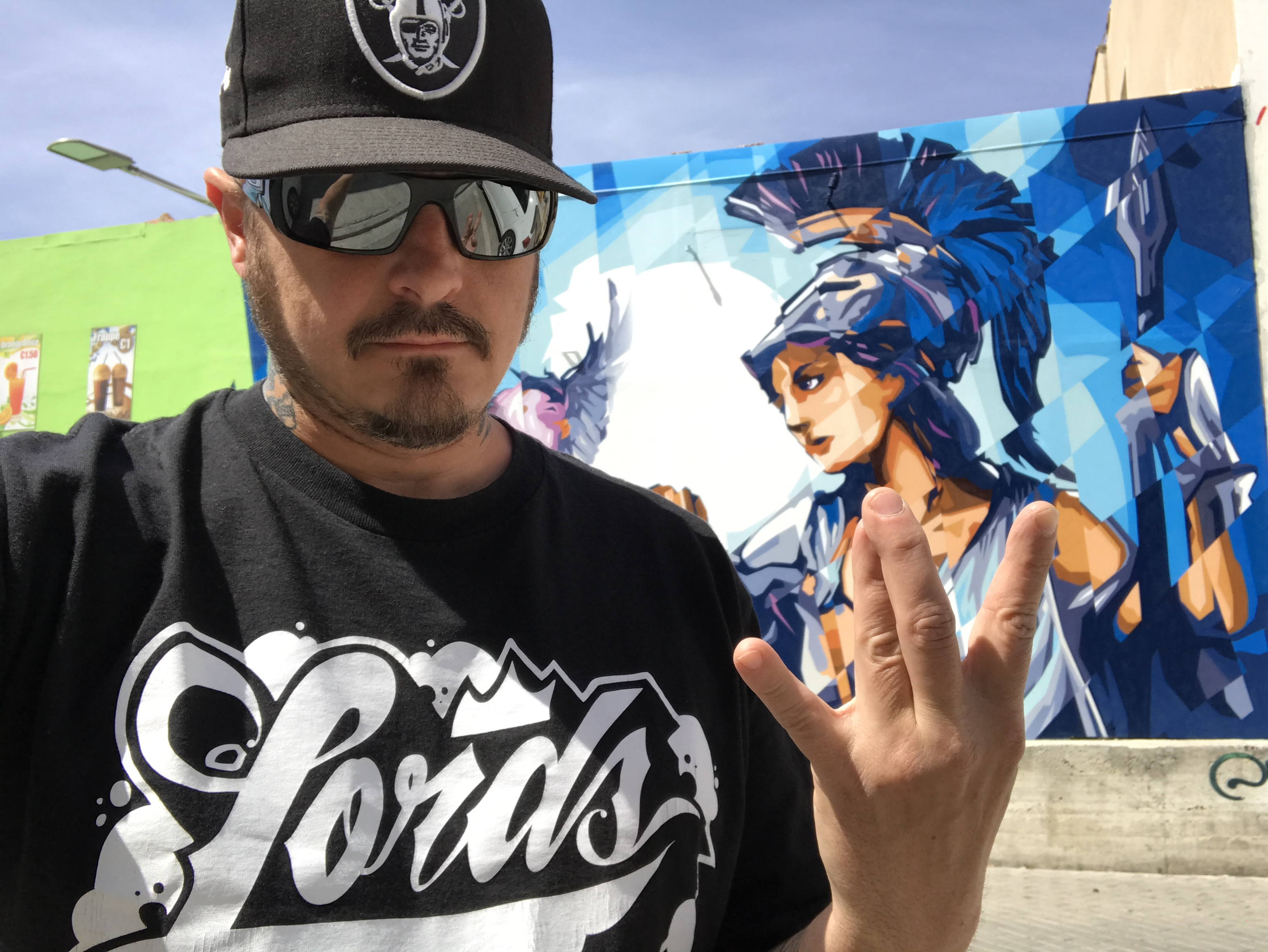 murales a cipro